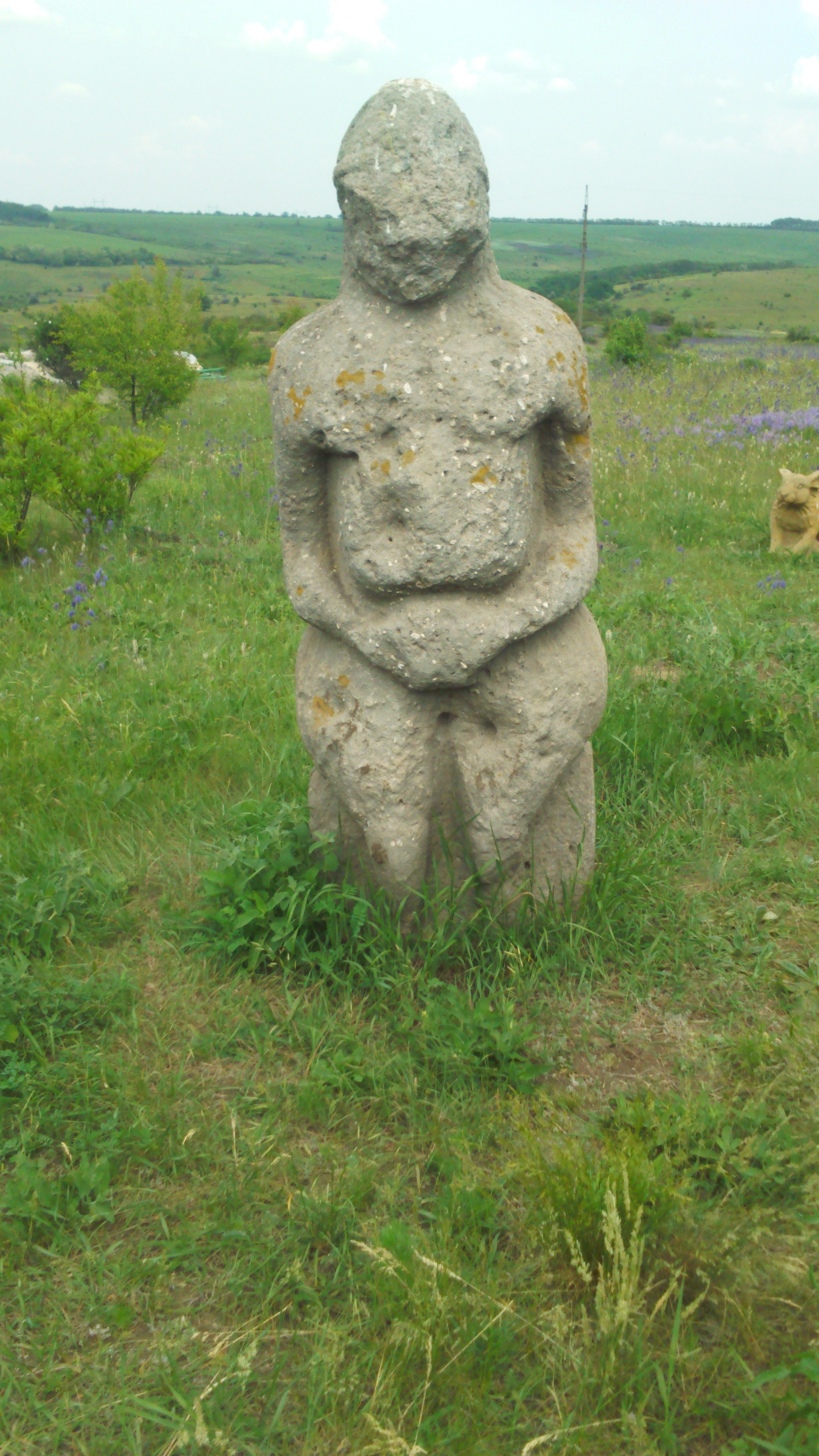 Половецька кам'яна баба біля села Никанорівка Добропільський район.